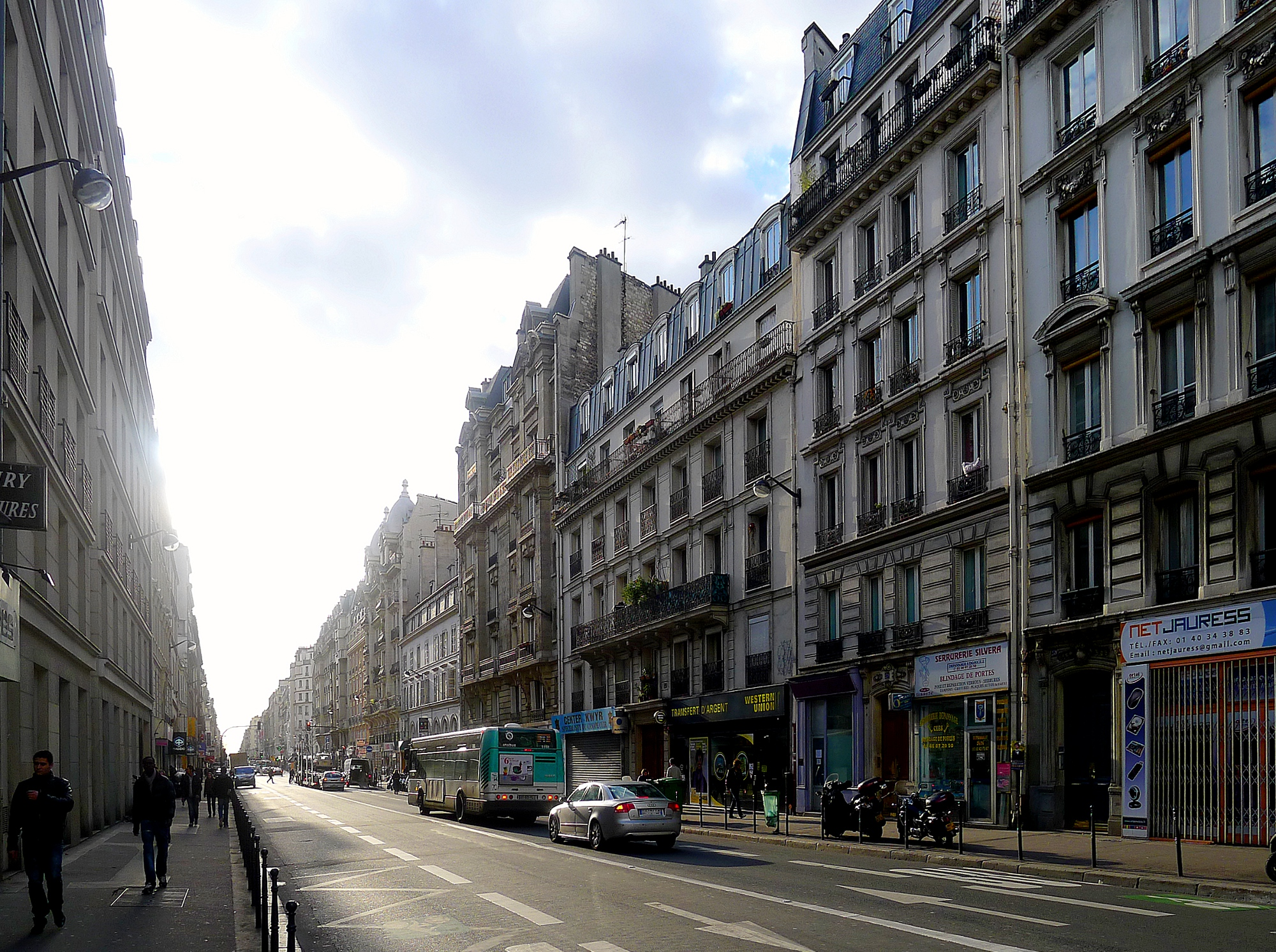 Rue Lafayette (vue de la place de la Bataille-de-Stalingrad) - Paris X